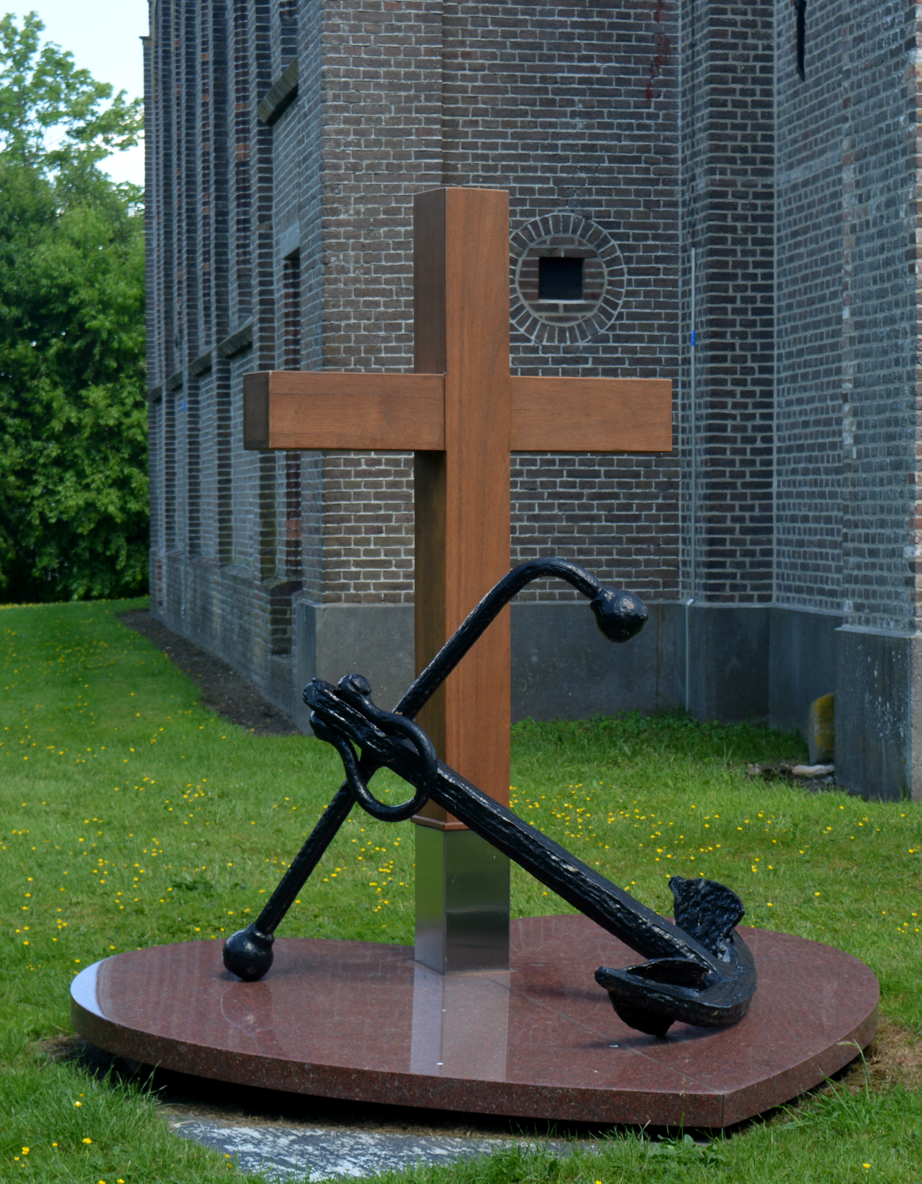 Koostertille, Benedictuskerk, kunstwerk